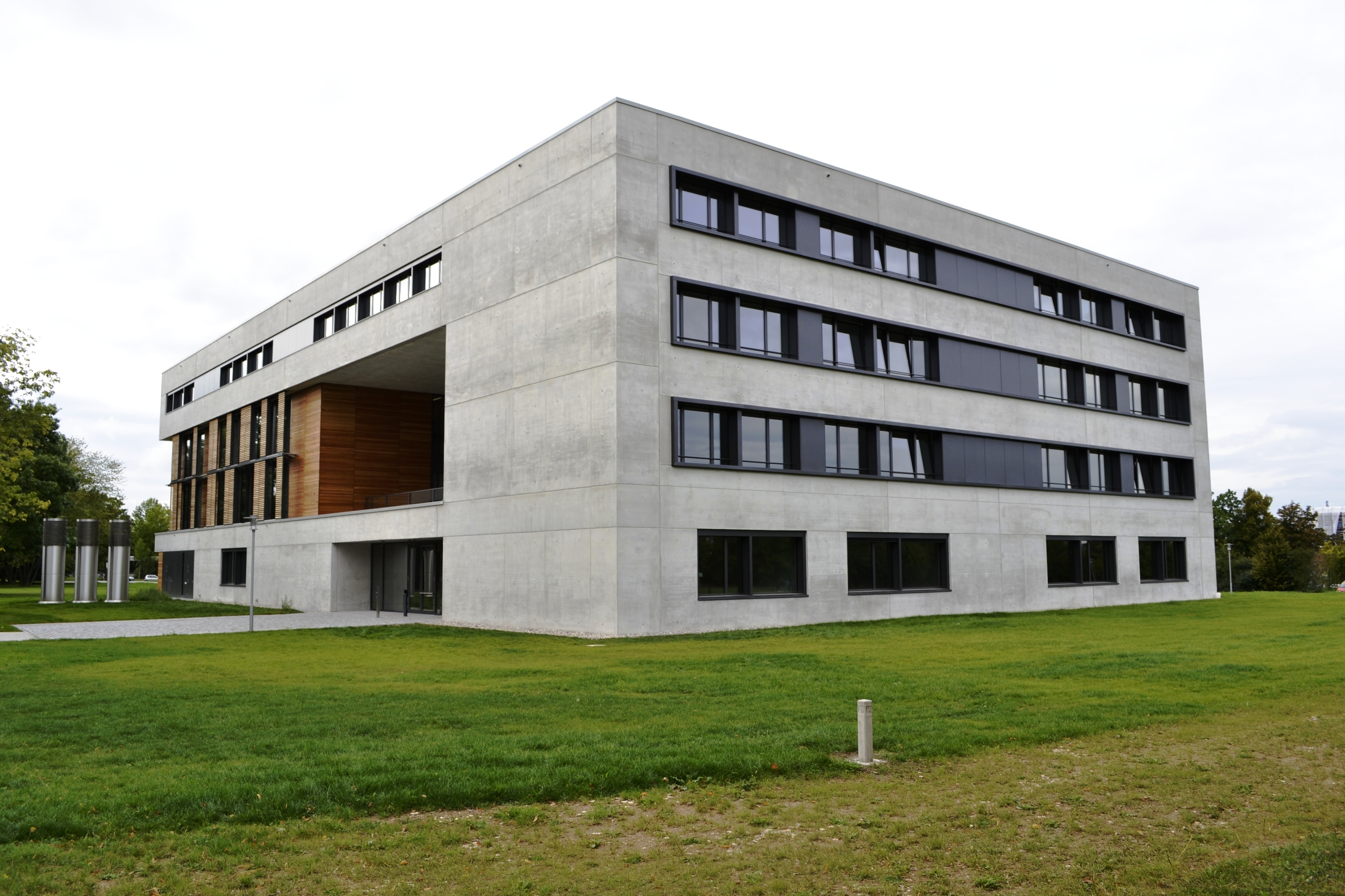 Das Vielberth-Gebäude an der Uni Regensburg. Es beherbergt die IRE/BS International Real Estate Business School der Universität.